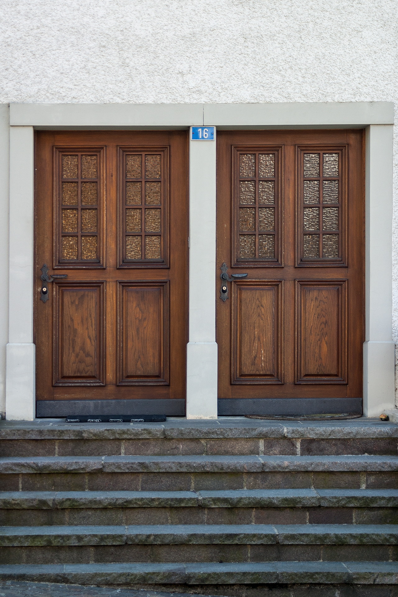 Historisch bedingte Doppeleingänge in Endingen (AG)